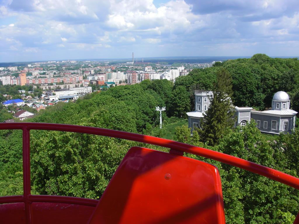 г. Пенза